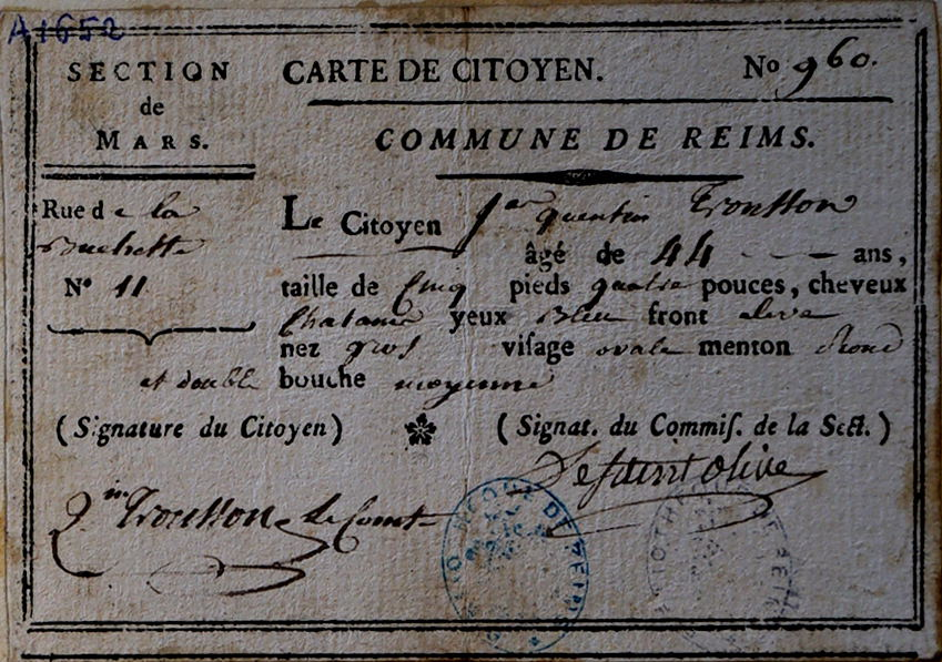 Tronsson Lecomte : sa carte de citoyen isuue de la BMR.